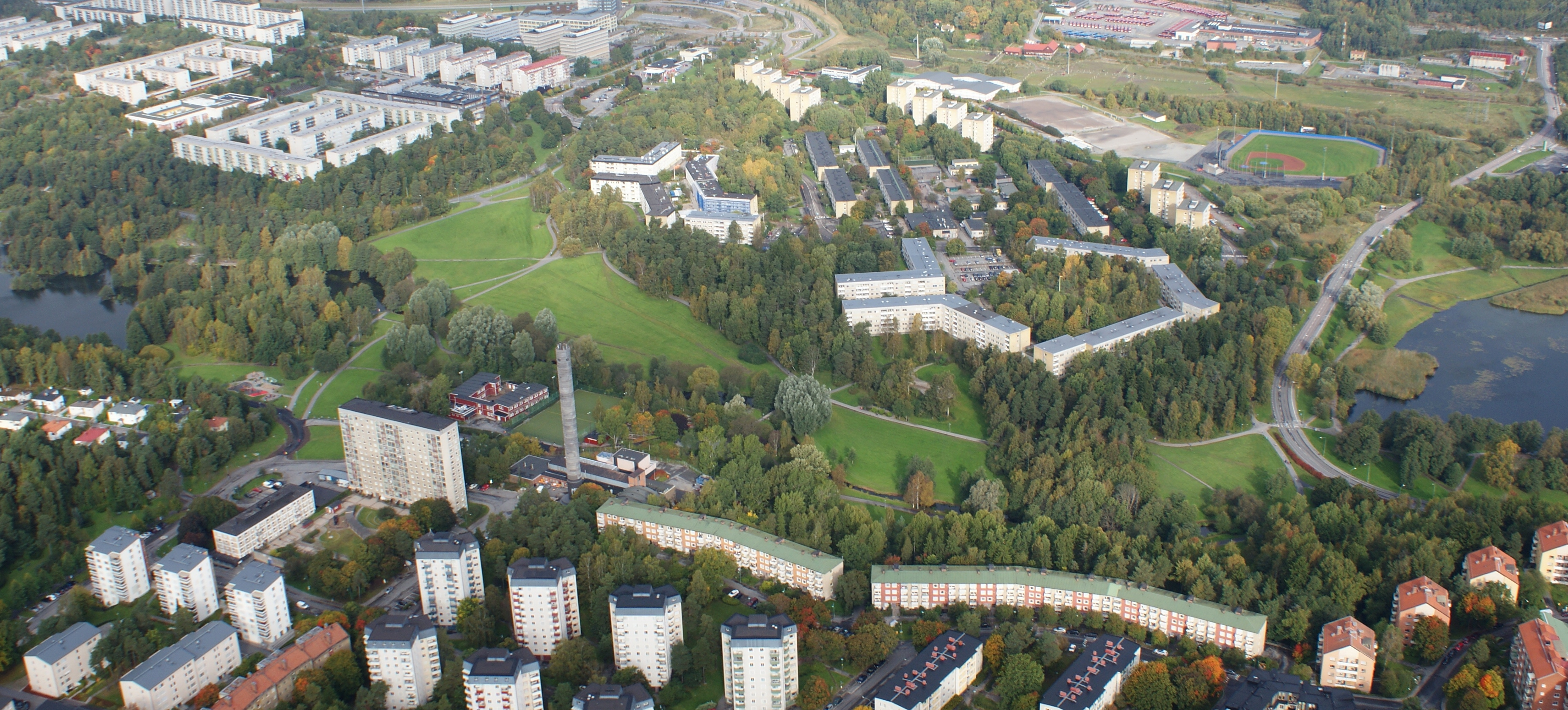 Golfängarna.